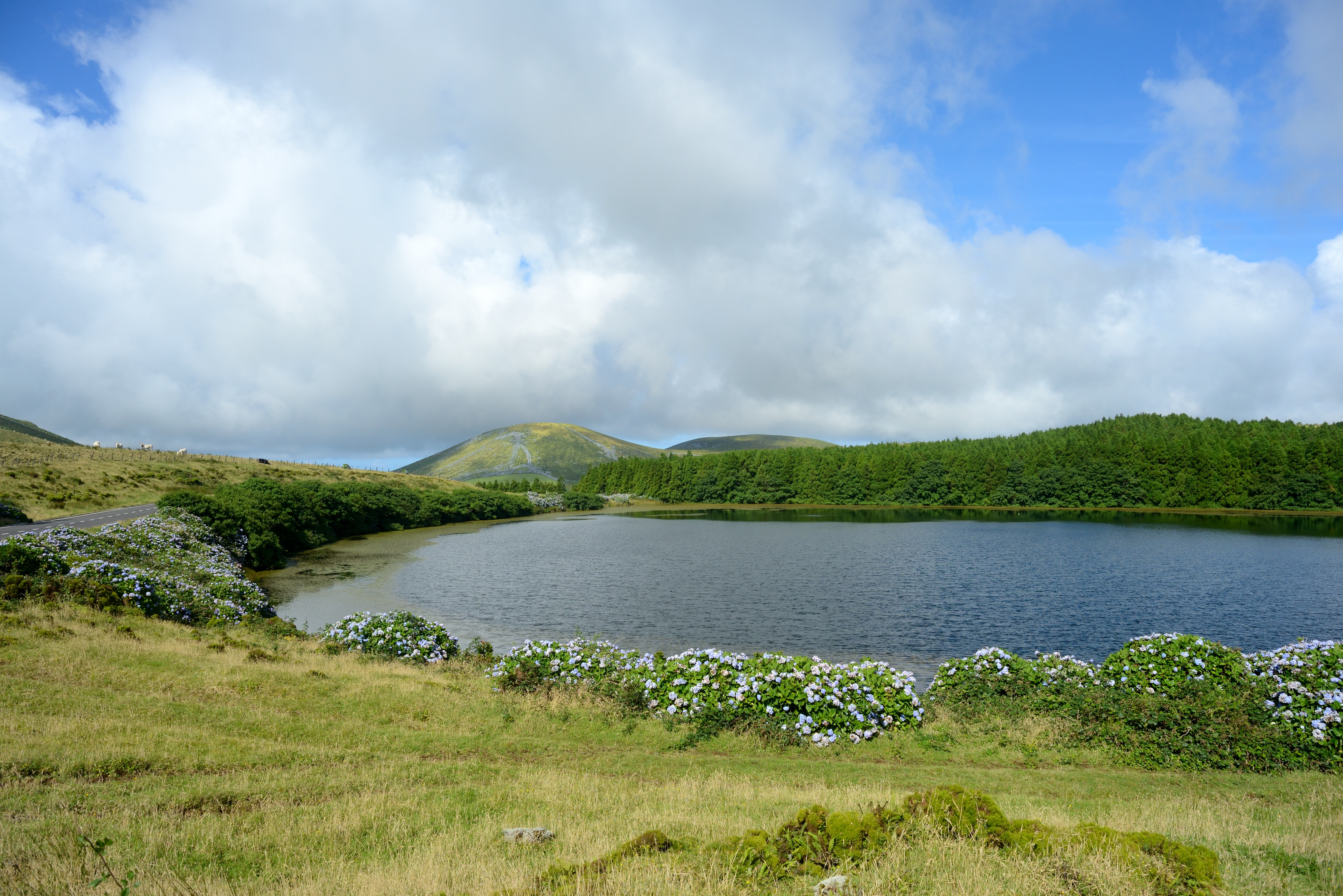 Laguna nella Caldeira da Lomba (Isola di Flores, Azzorre)